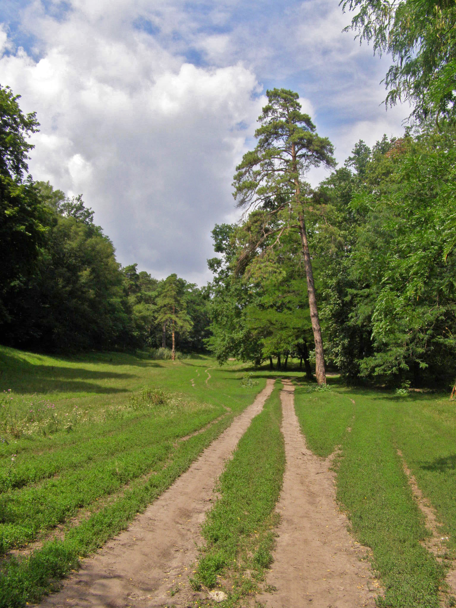 «Ташанський», Переяслав-Хмельницький район, Ташанська сільська рада